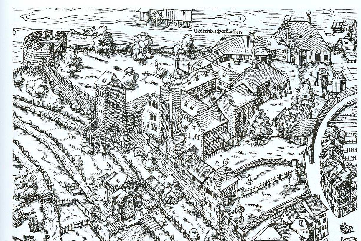 Kloster Oetenbach auf dem Murerplan von 1576